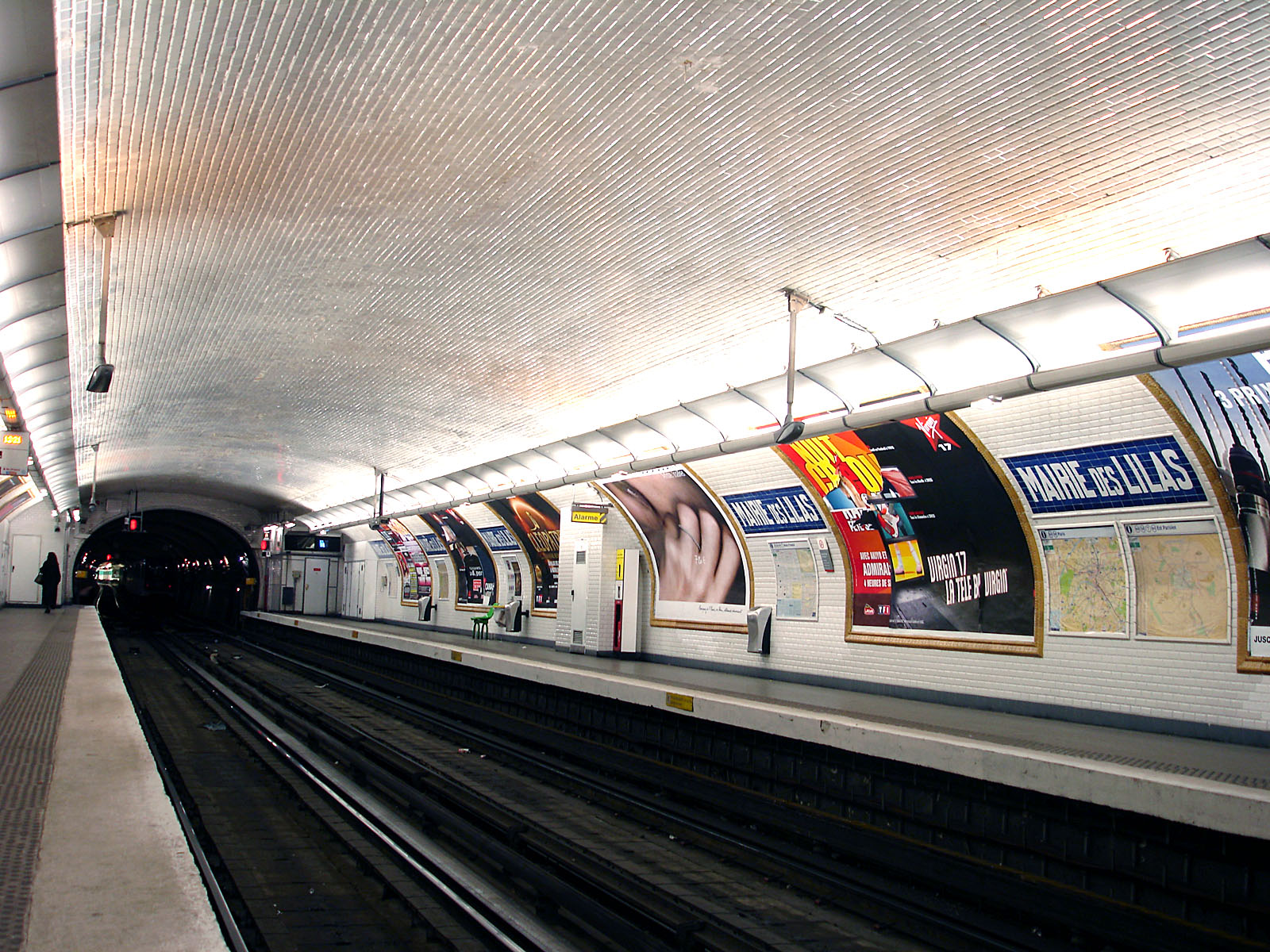 Station Mairie des Lilas de la ligne 11 du métro de Paris, France.